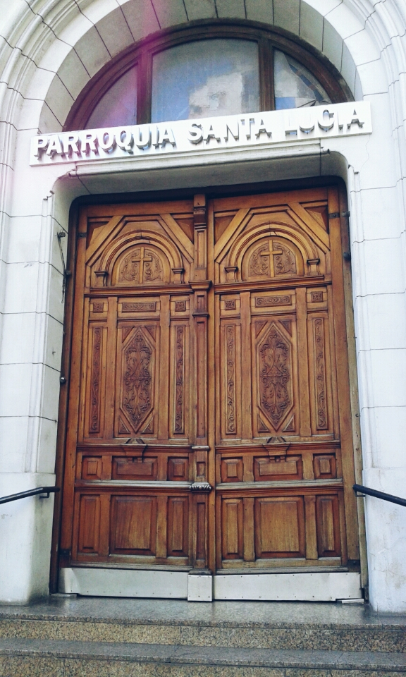 La iglesia parroquial de Santa Lucía estaba situada en el Camino de la Ensenada de Barragán y Pampas, luego llamada calle Larga, Avda. Santa Lucía y hoy avenida Montes de Oca, en Buenos Aires, Argentina. Hubo antes un oratorio y capilla pública de Santa Lucía, en una quinta propiedad de don Juan Antonio de Alquizalete. Sus orígenes datan de 1733, y se hallaba en el lugar que hoy cruzan las calles Sarmiento y Montevideo, lo cual fue causa de que la primera de las arterias nombradas se denominara Santa Lucía, allá por 1777.